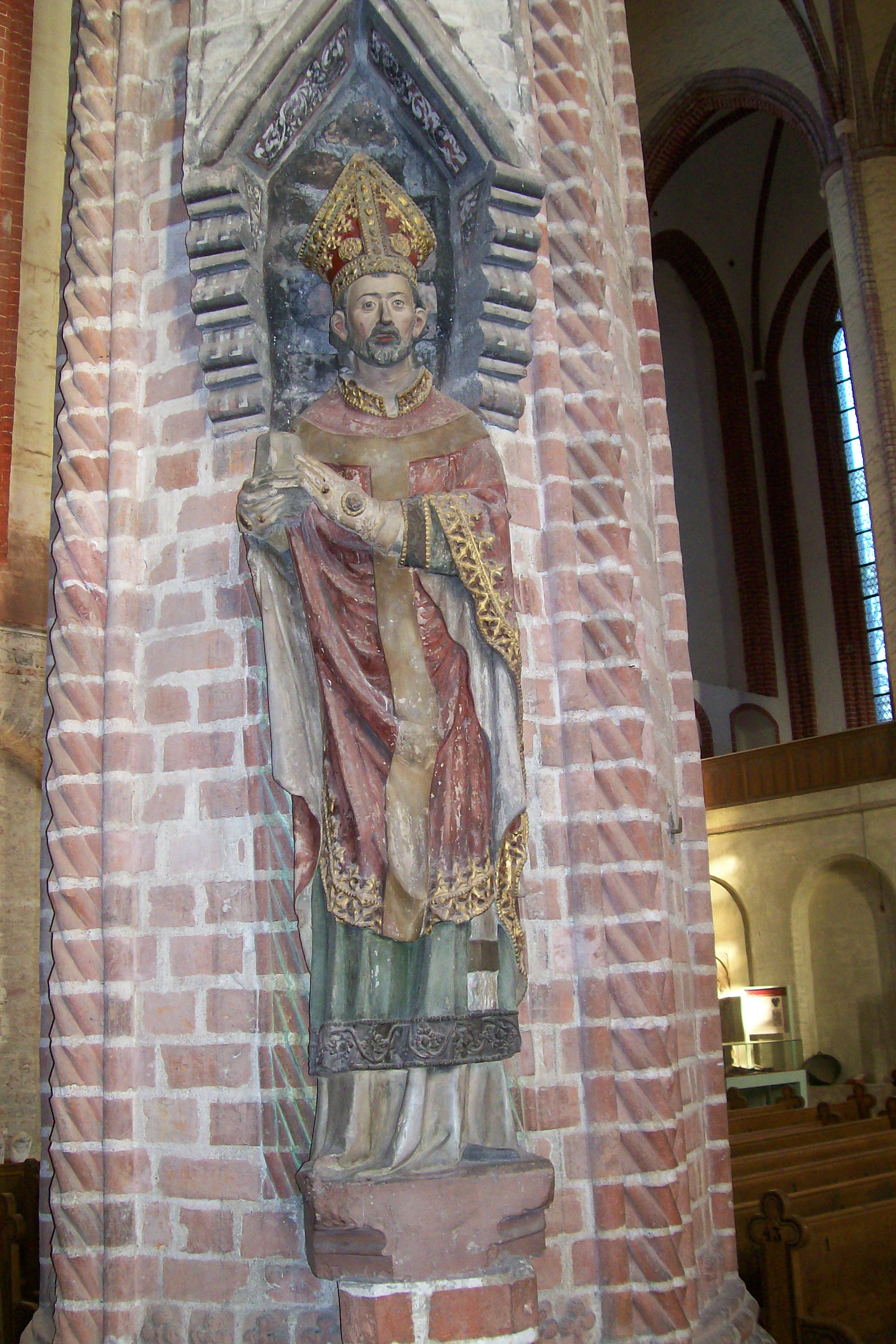 Statue des Bischofs Johann Wöpelitz in der Wunderblutkirche Bad Wilsnack (Brandenburg), spätes 14. Jahrhundert, Sandstein, Werk von Peter Parler